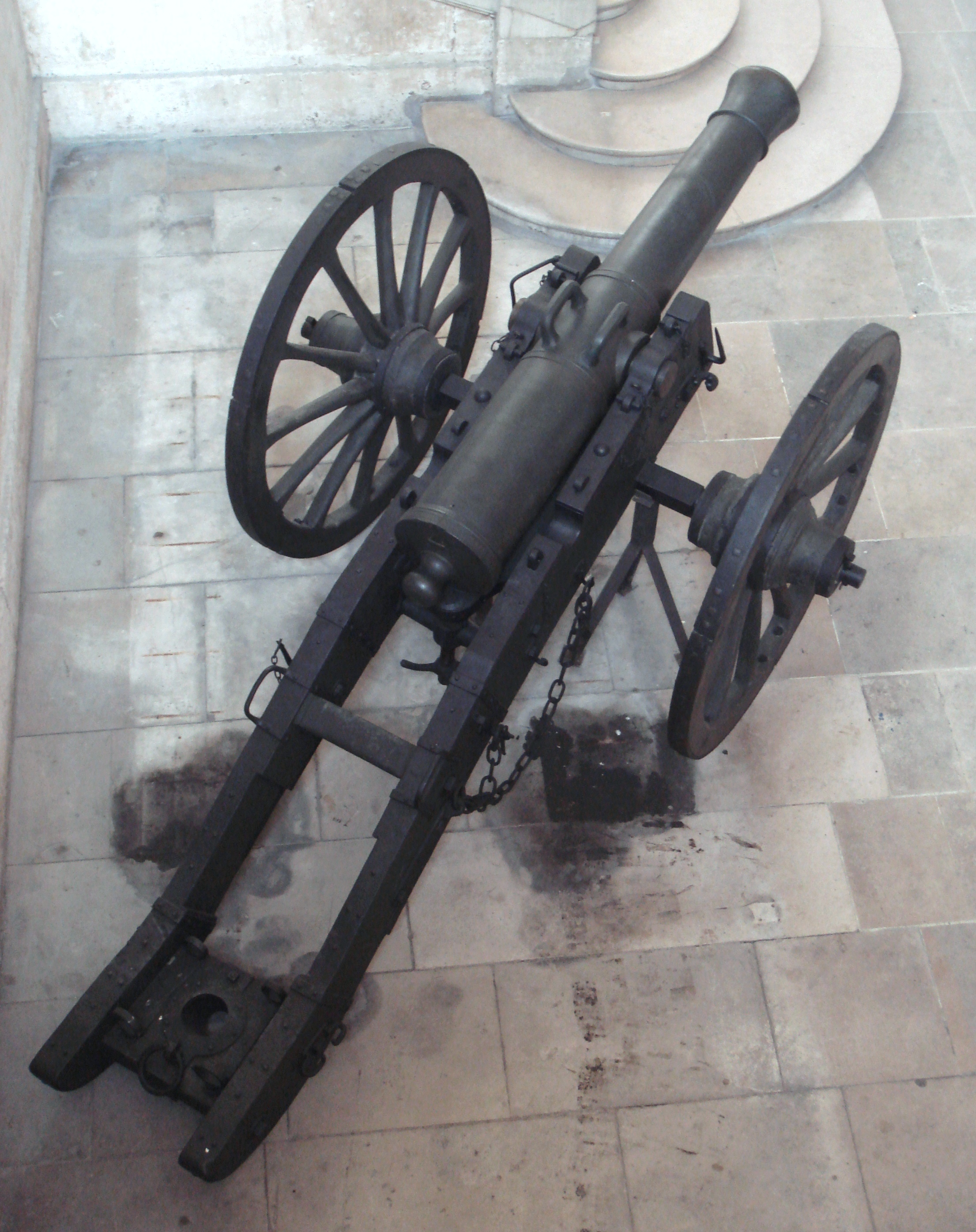 Gribeauval_cannon_de_12_An_2_de_la_Republique_top_view